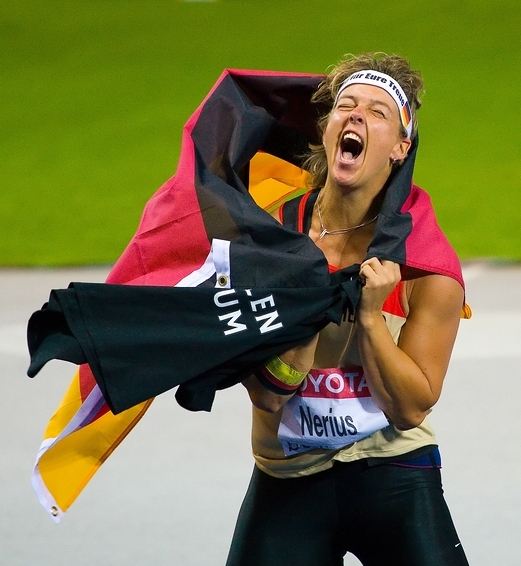 Steffi Nerius - Weltmeisterin im Speerwerfen